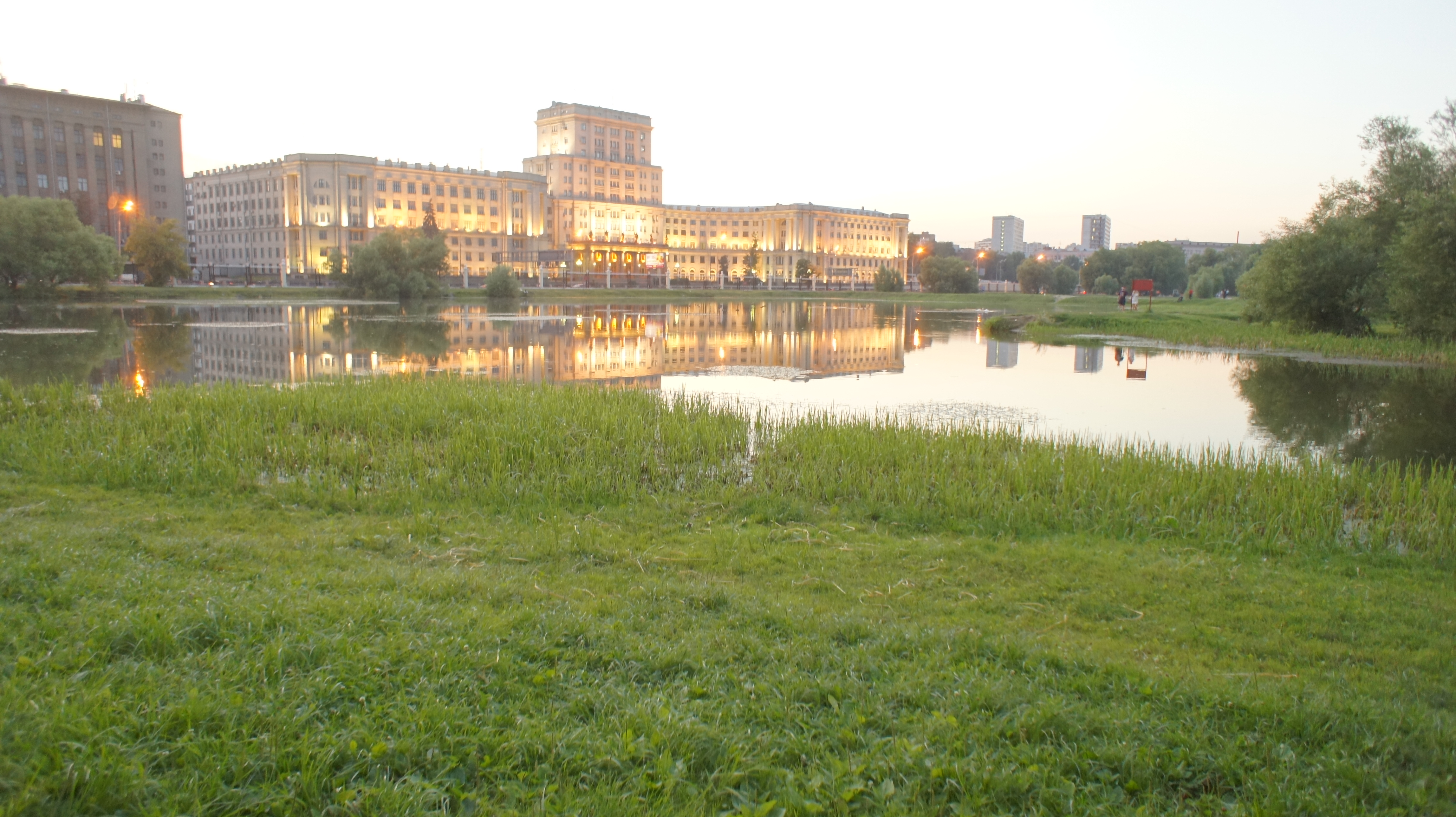 မြန်မာဘာသာ: ဘောင်းမန်းနည်းပညာတက္ကသိုလ်အား ညနေခင်းအချိန်တွင် မြင်ရပုံ